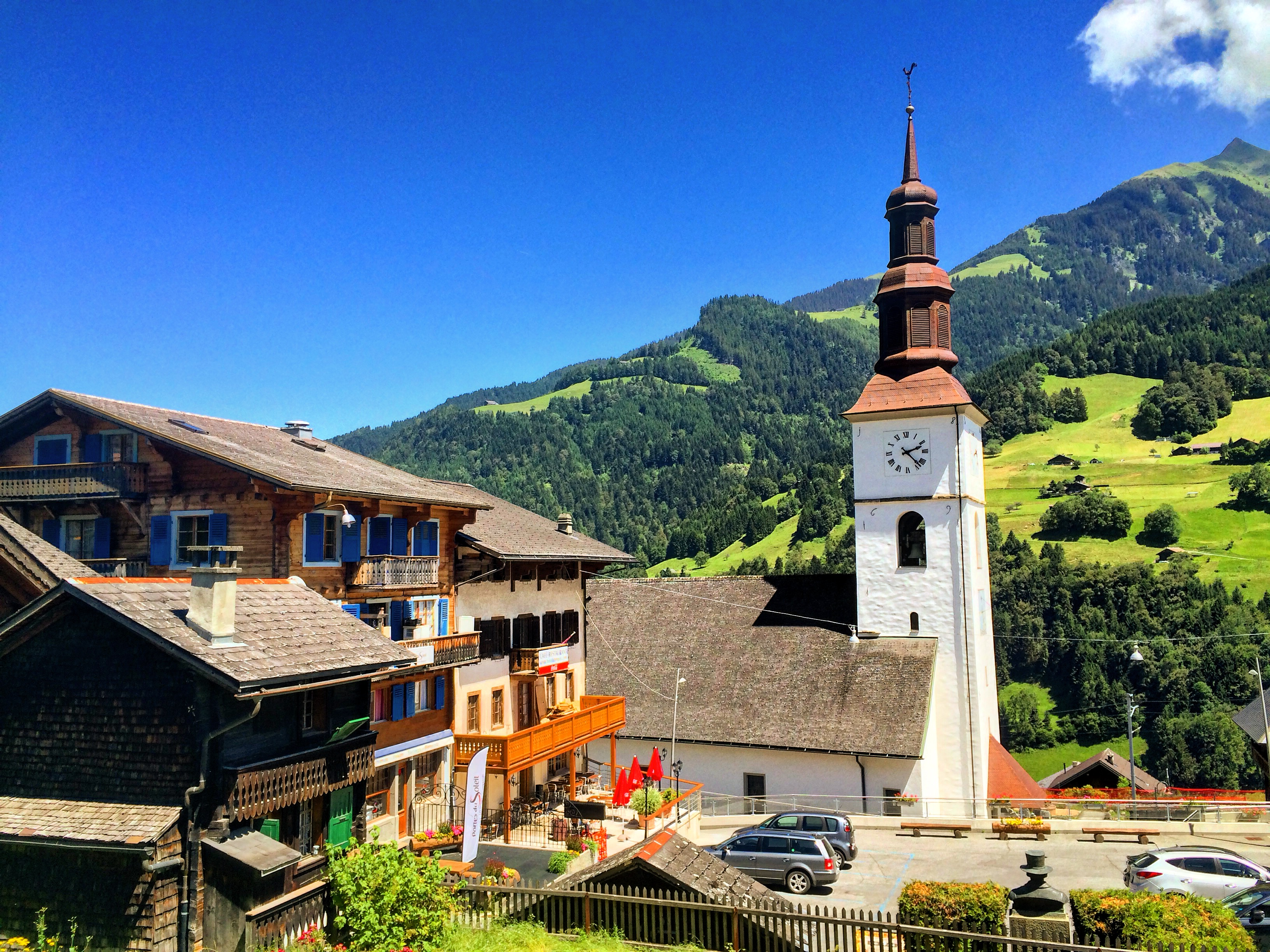 Le village du Val-d'Illiez en été.